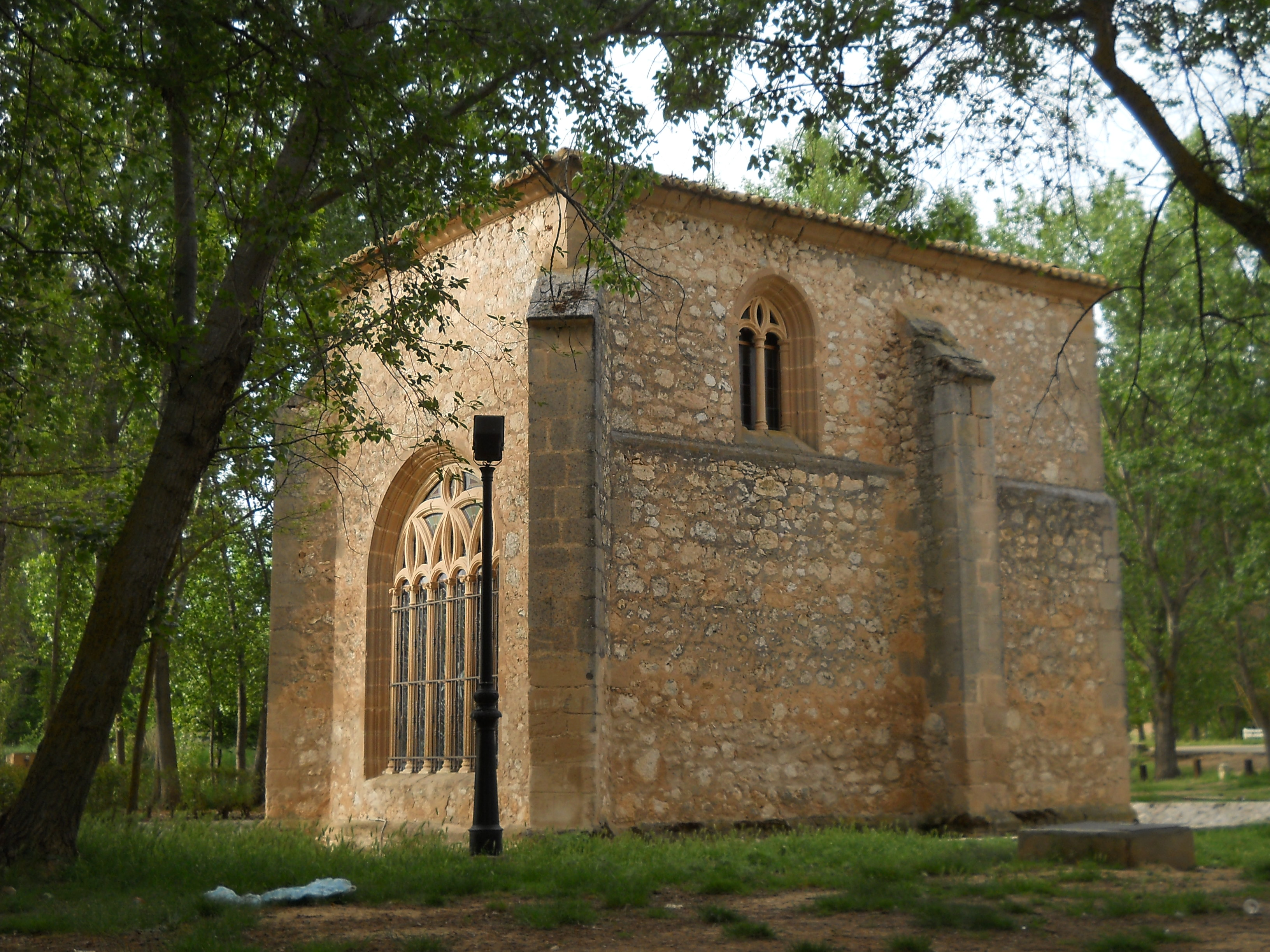 Ermita de Sopetrán, Hita, Guadalajara, España